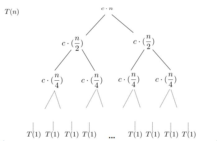 Rekursionsbaum